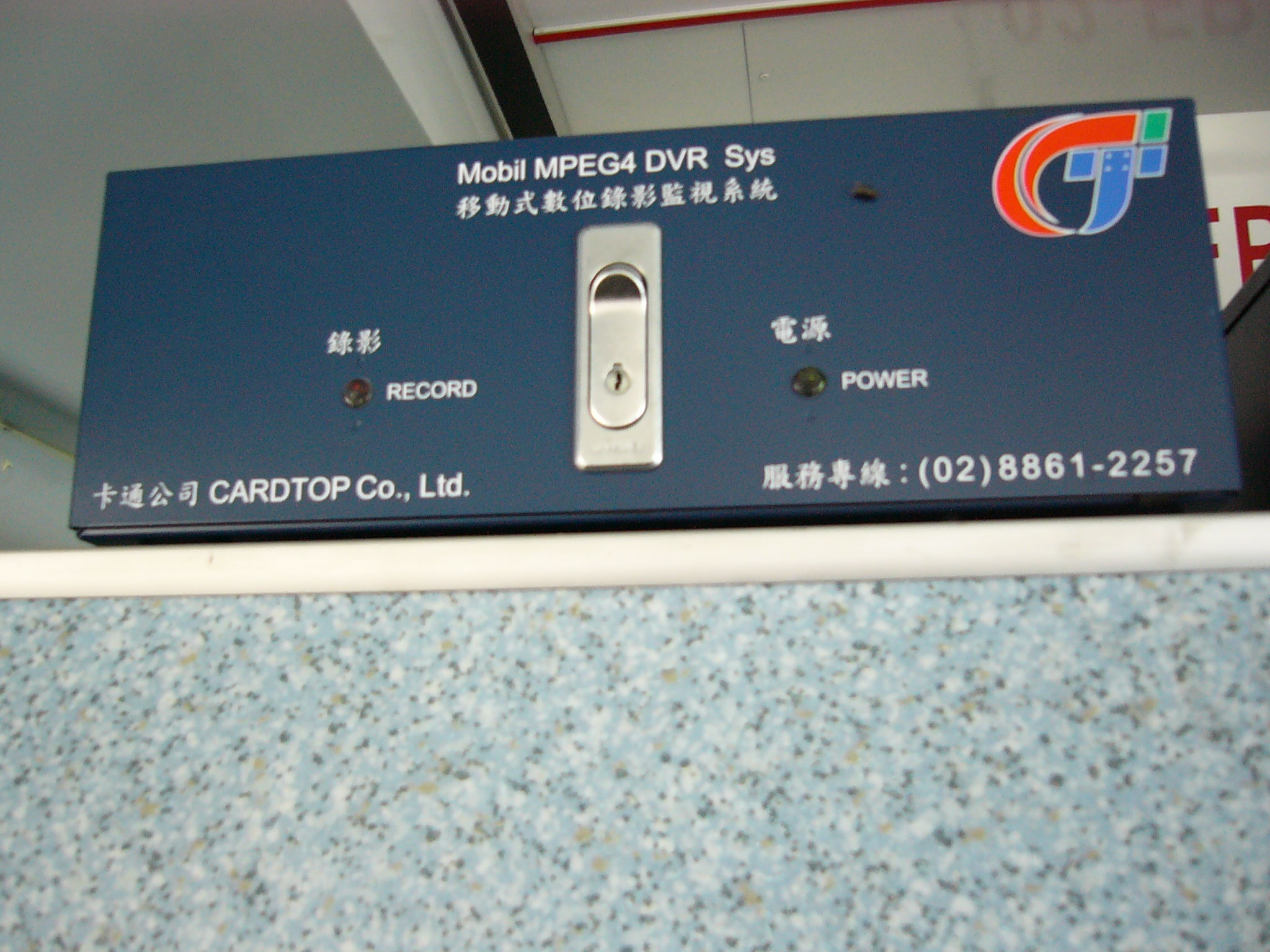 卡通股份有限公司（Cardtop Co., Ltd.）移動式數位錄影監視系統，安裝在指南客運大客車102-FP車尾。